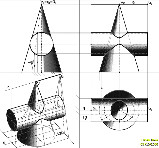 Intersezione tra un cono e un cilindro La quartica d’intersezione in questo caso, è determinata assumendo dei piani ausiliari passanti per il vertice delle due superfici, vale a dire quei piani che hanno in comune la retta r, quella passante per il vertice del cono e paralleli all'asse del cilindro. Nota: il cilindro è considerato un cono con il vertice improprio e perciò in ciascuno dei tre casi precedenti, i piani secanti sono quelli passanti per i vertici delle due superficie presi in esame